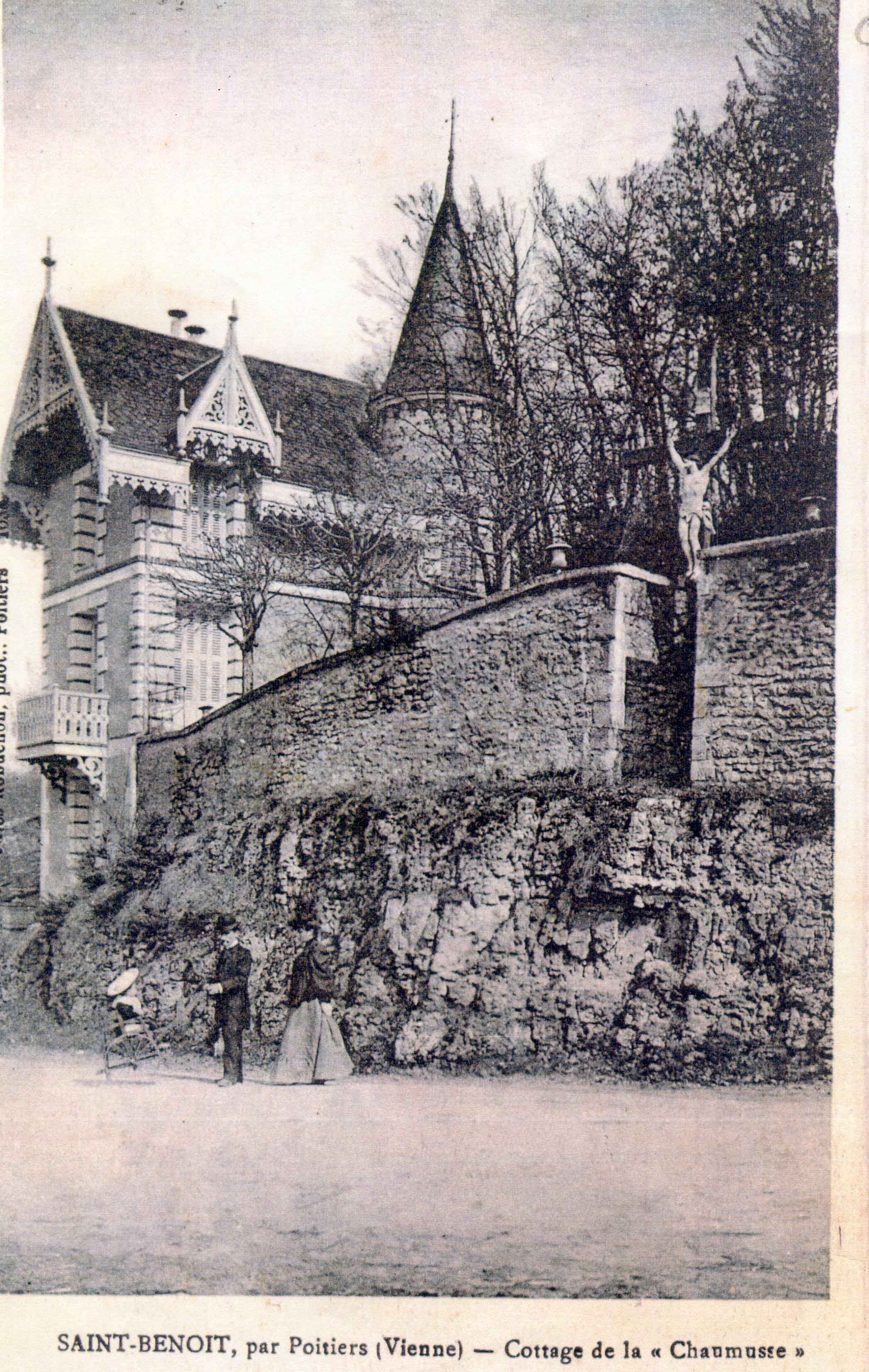 Maison de Le Falher et de Puvis de Chavanne à Saint-Benoit 86